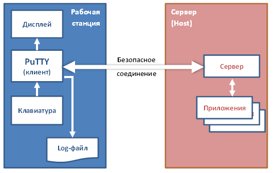 Схема удаленного доступа к хосту с помощью PuTTY